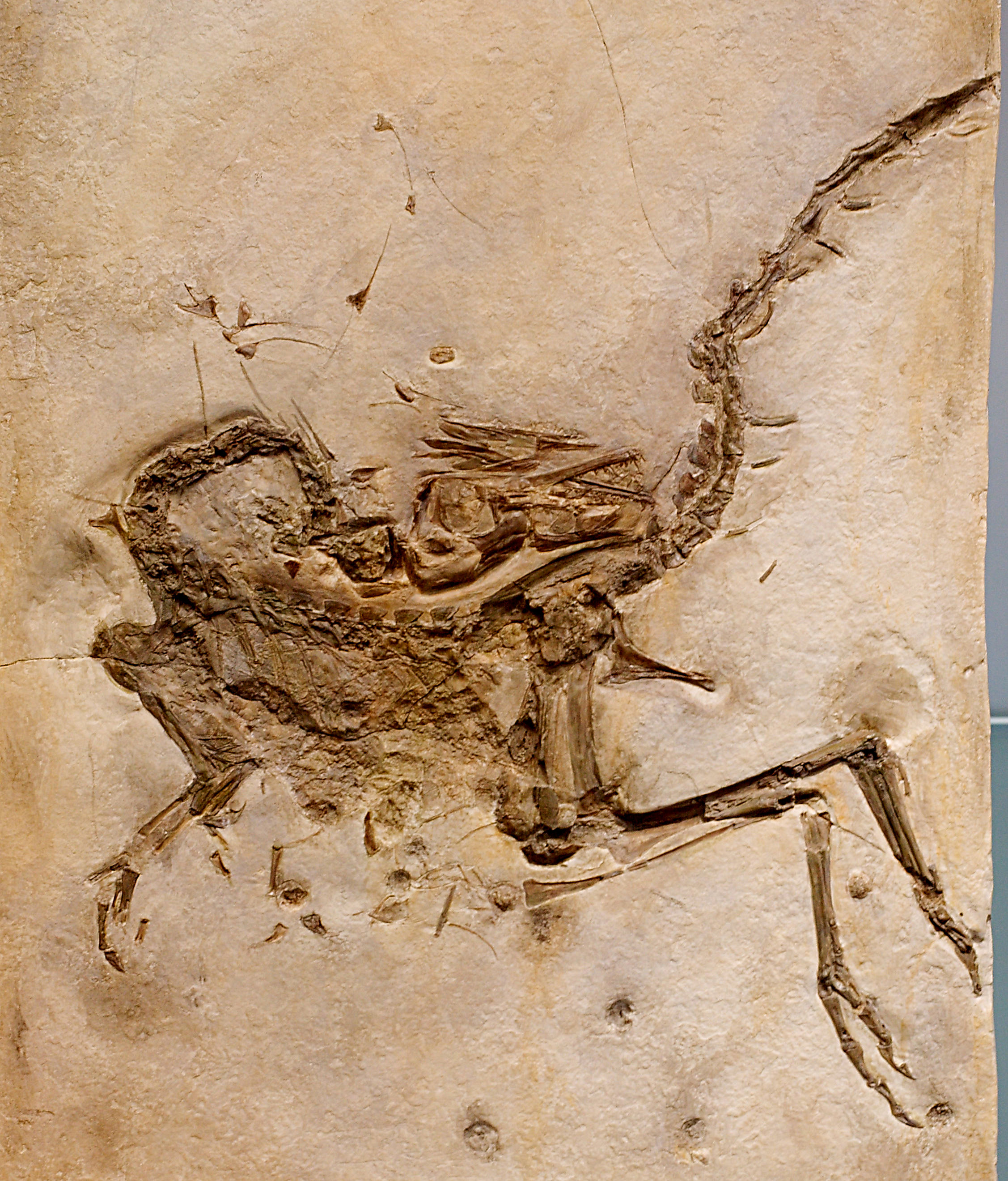 Bayerische Staatssammlung für Paläontologie und Geologie